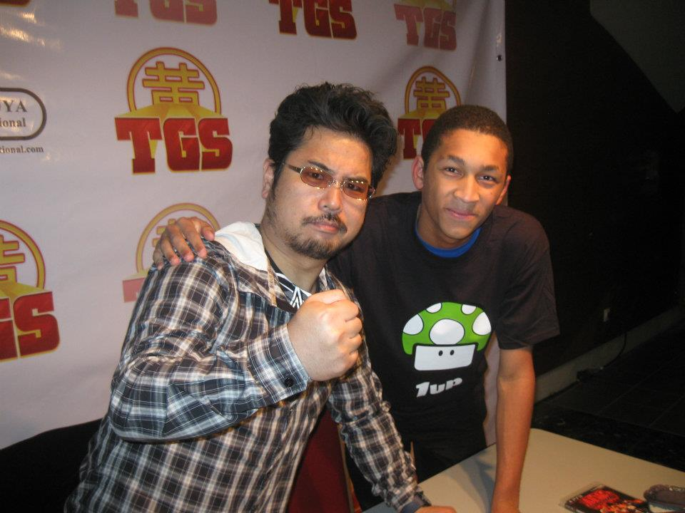 Katsuhiro Harada lors du TGS